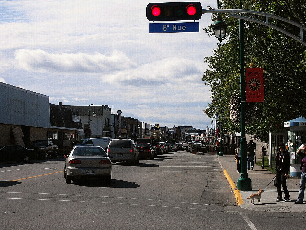 バル＝ドール, ケベク, カナダ。